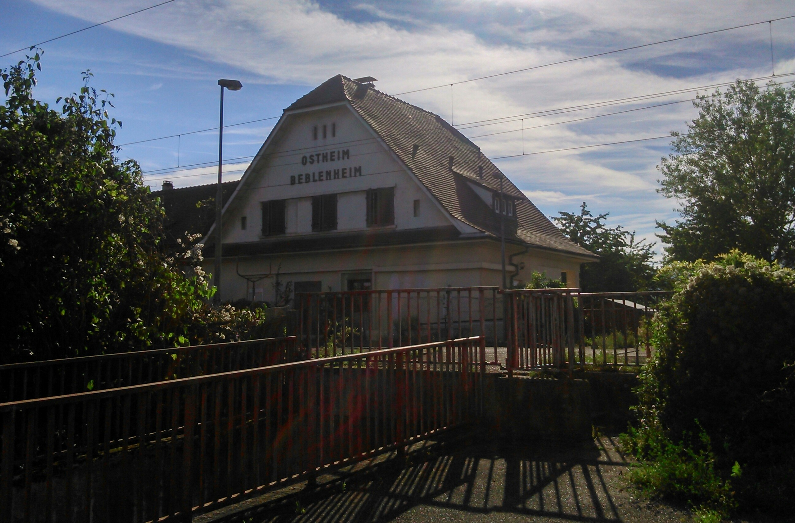 Ancienne gare d'Osteheim - Beblenheim.